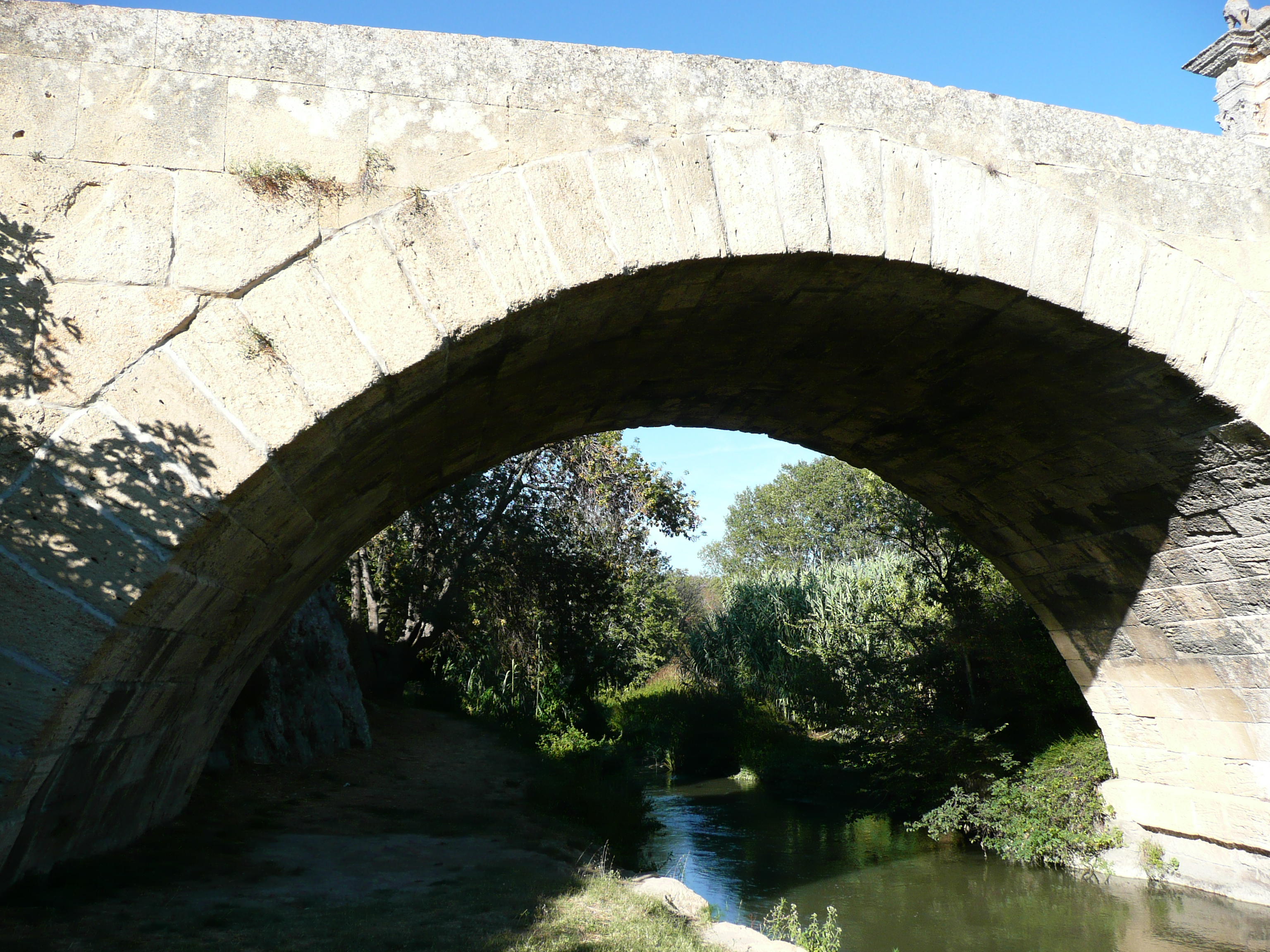 Pont Flavien